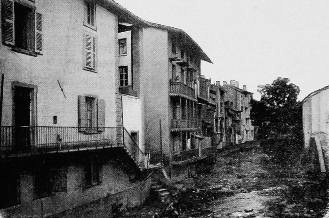 Dictionnaire illustré des communes du département du Rhône. Tome 2 / par MM. E. de Rolland et D. Clouzet.